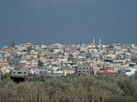 صورfة لقرية جت، منظر للجهة الغربية للقرية